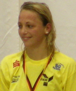 121. DM Schwimmen in Berlin